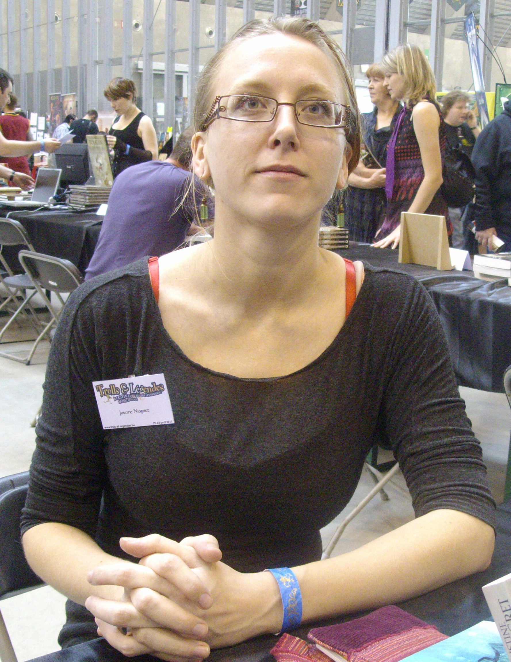 Justine Niogret au festival Trolls et légendes de Mons